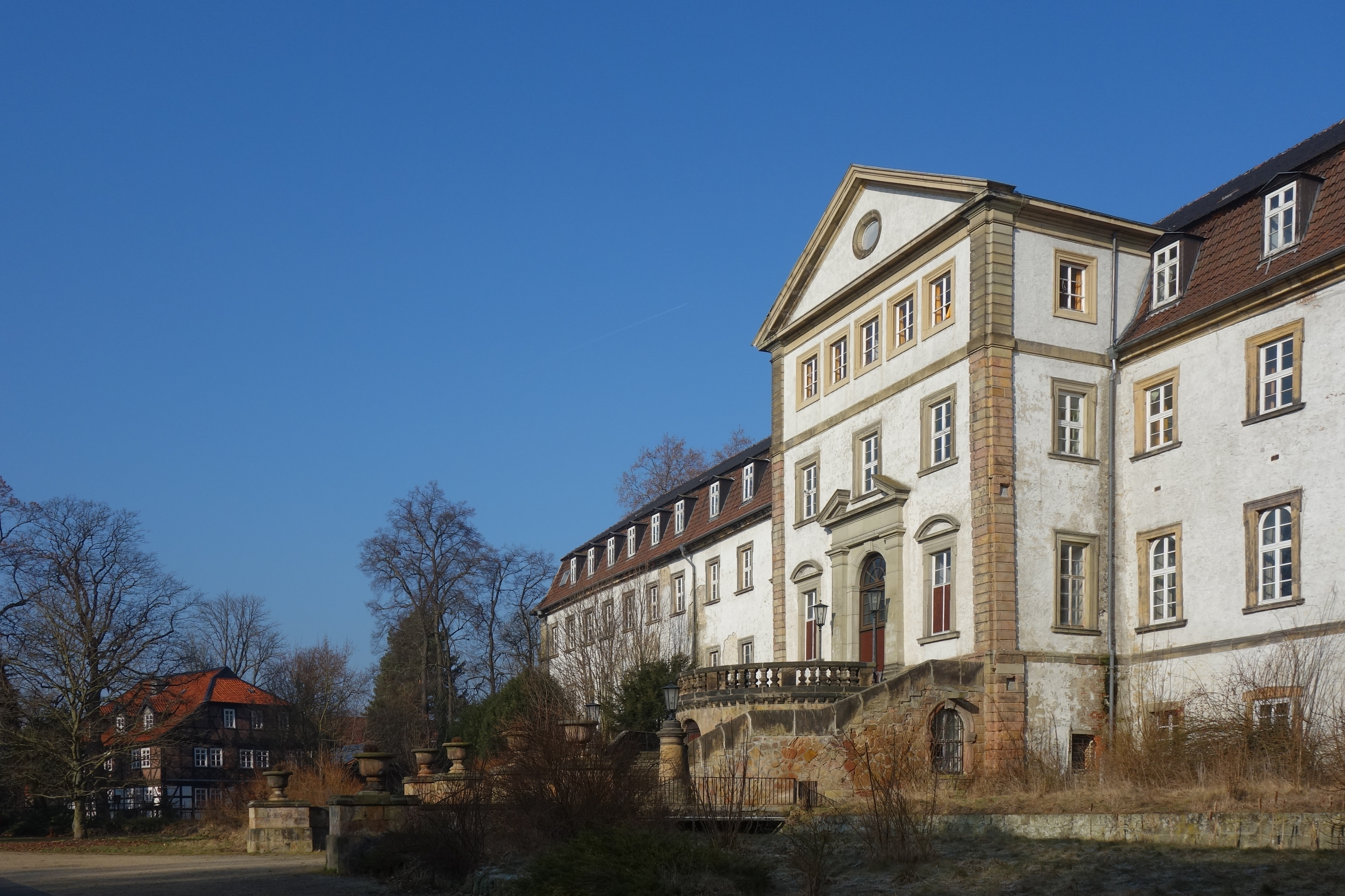 Salzgitter-Ringelheim, Schloss Ringelheim - Südflügel, im Hintergrund die Klostermühle